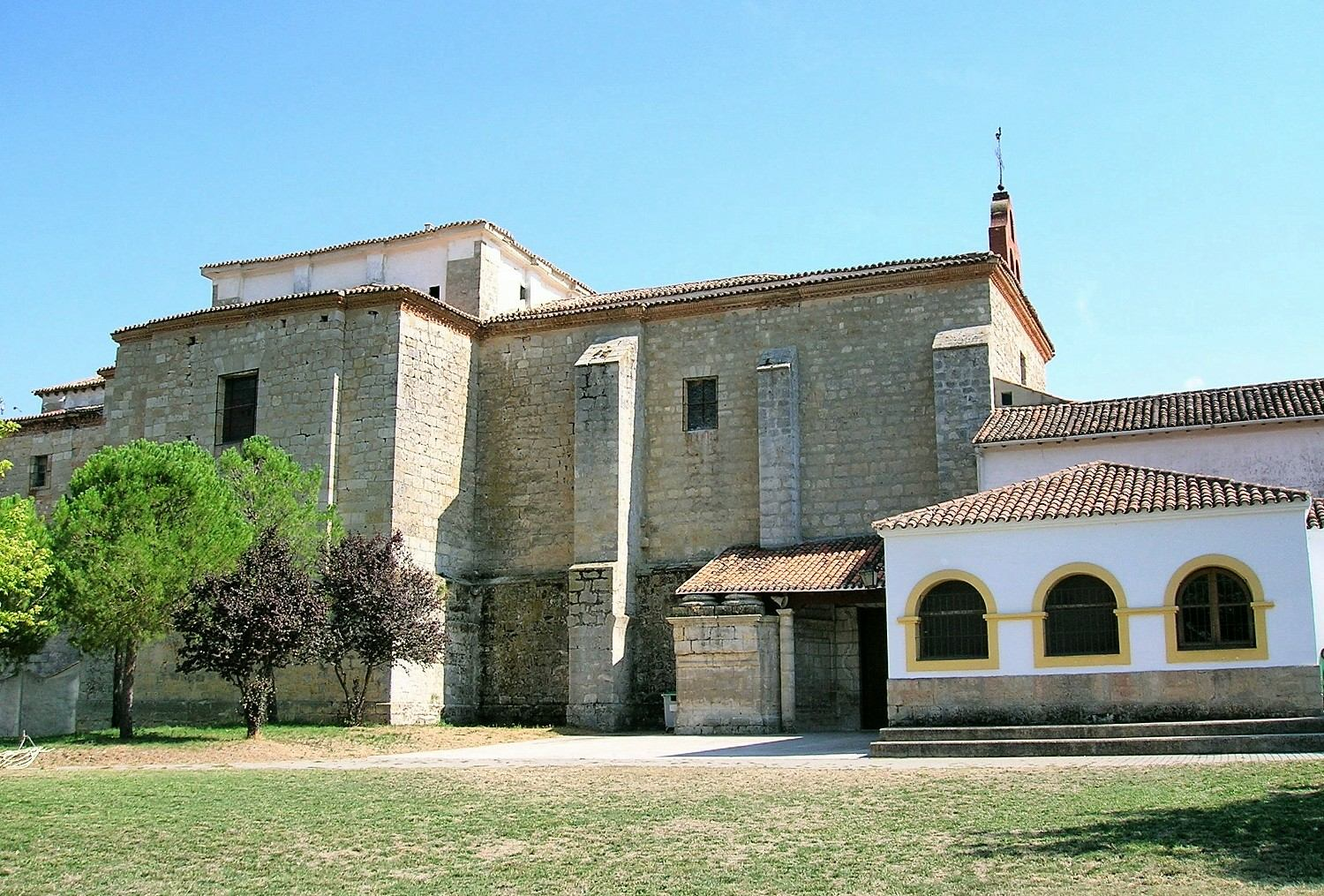 Monasterio de monjas Cistercienses y Santuario de Nuestra Señora de Alconada (siglo XVIII), proximidades de Ampudia, Palencia, España/Spain